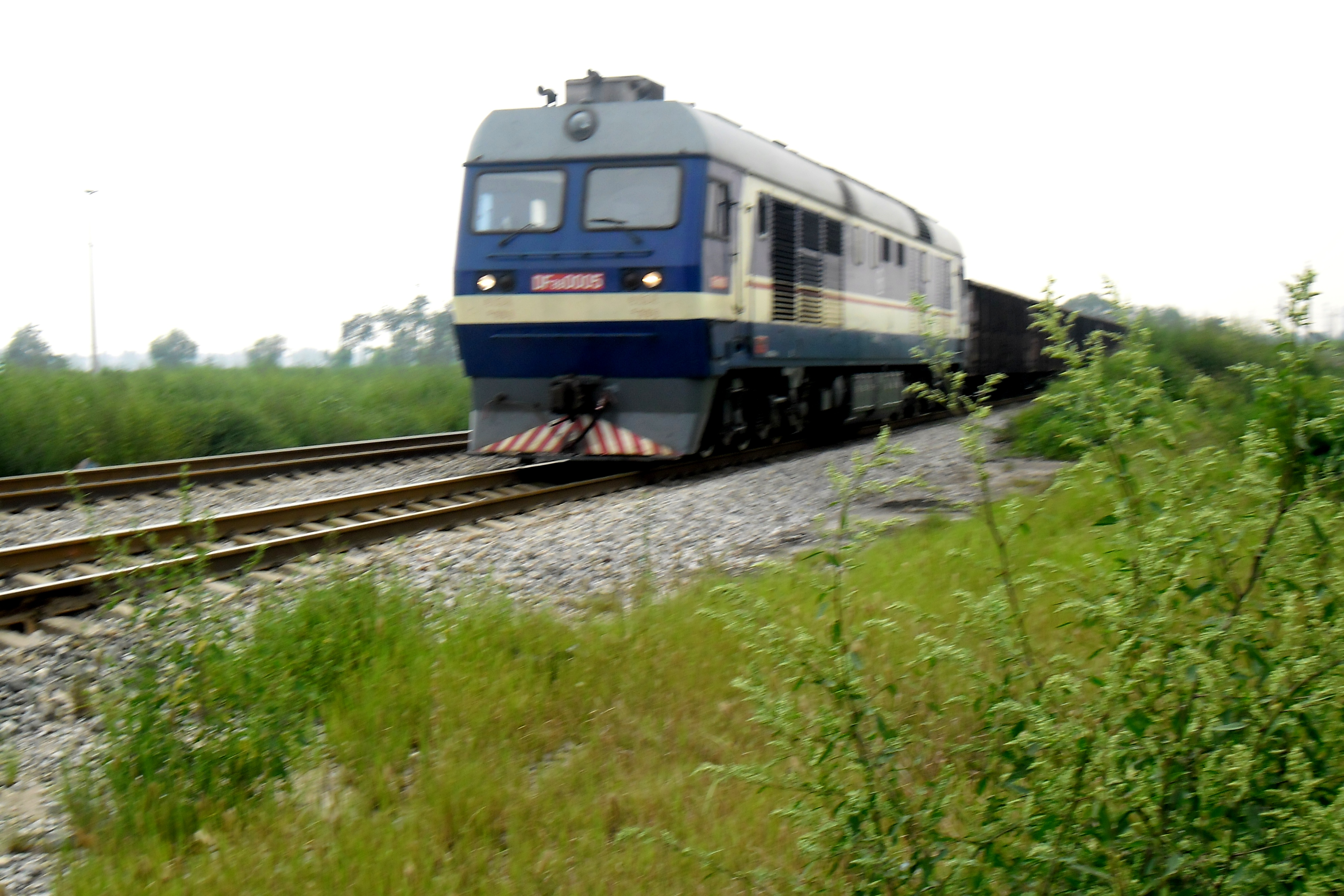 中文（中国大陆）: 津山铁路唐胥段（唐山南湖将军淀南岸）与东风机车（疑似DF11-0005）